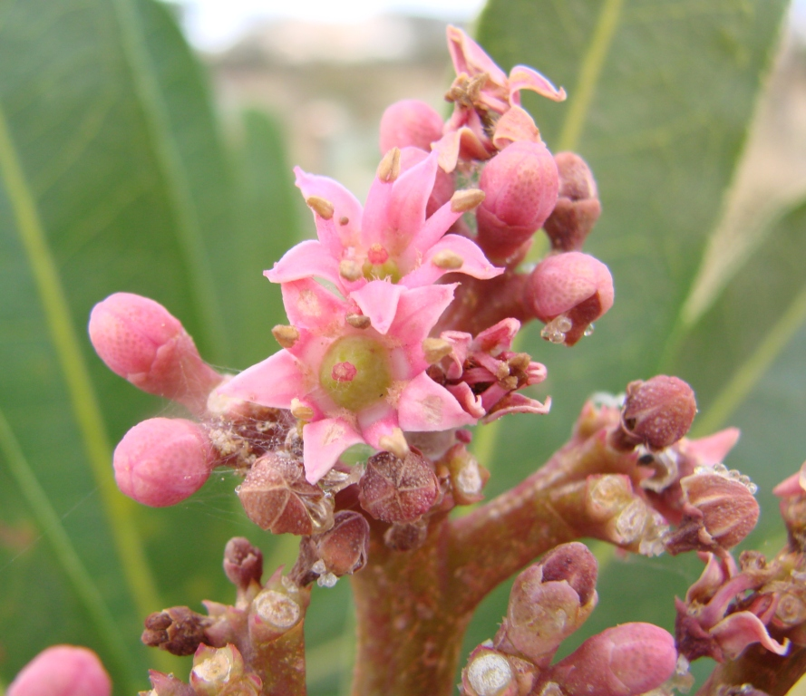 Hortia oreadica (ex H. brasiliana) - RUTACEAE Parque Estadual Serra dos Pirineus - Pirenópolis - Goiás - Brasil